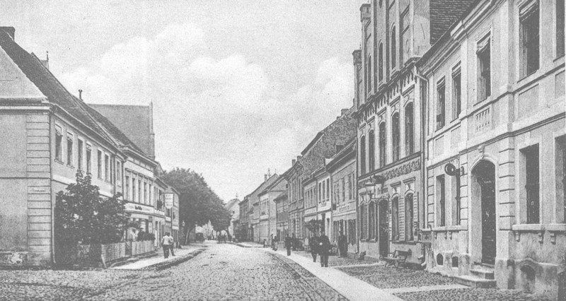 Budynki przy ówczesnej Königstraße w Greifenberg/Pommern - dziś ul. Wojska Polskiego w Gryficach (Polska)